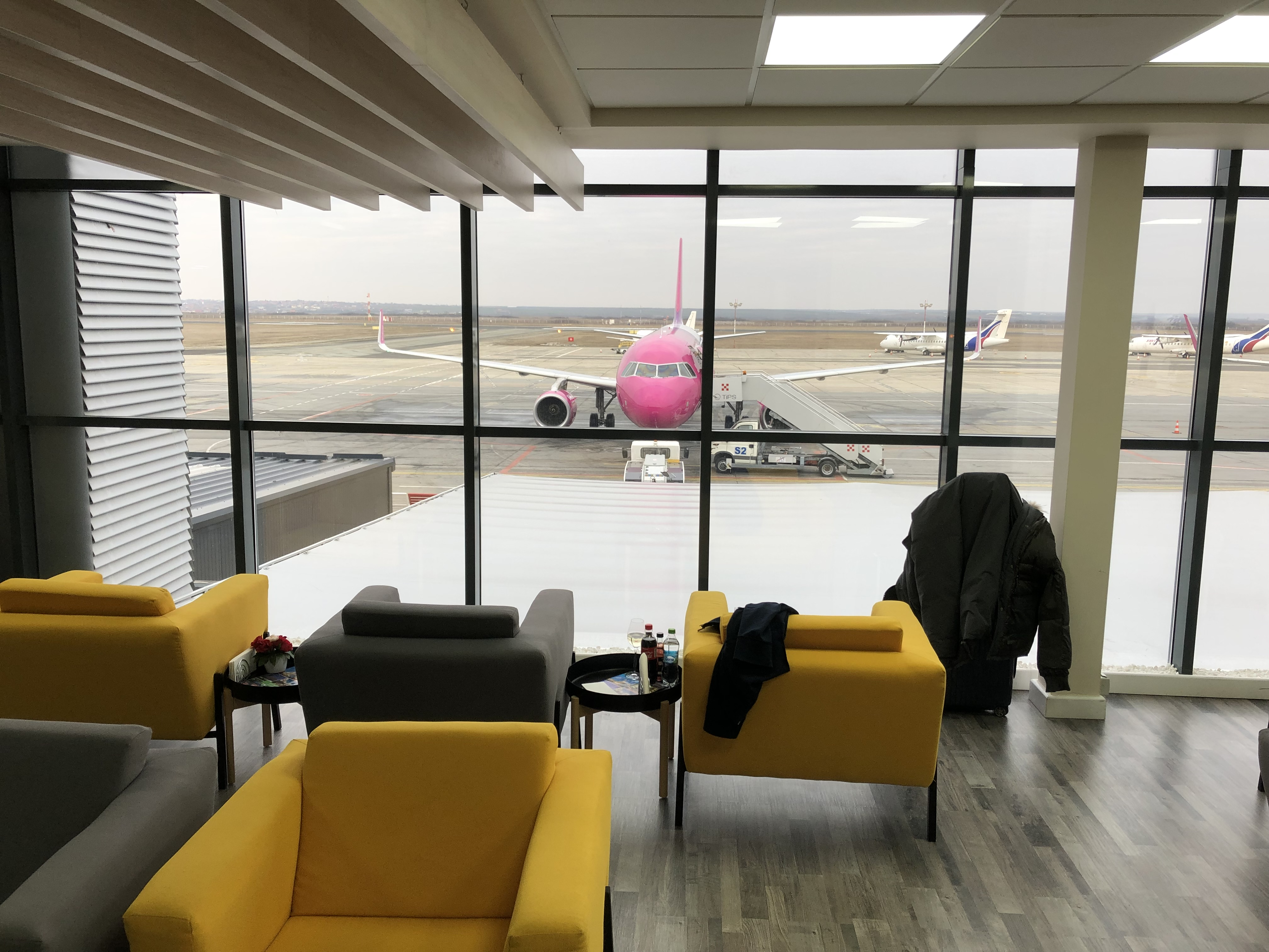 Tarmac view from TSR Business Class Lounge